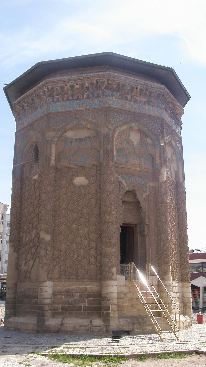 Kabud dome, Maragheh, Iran